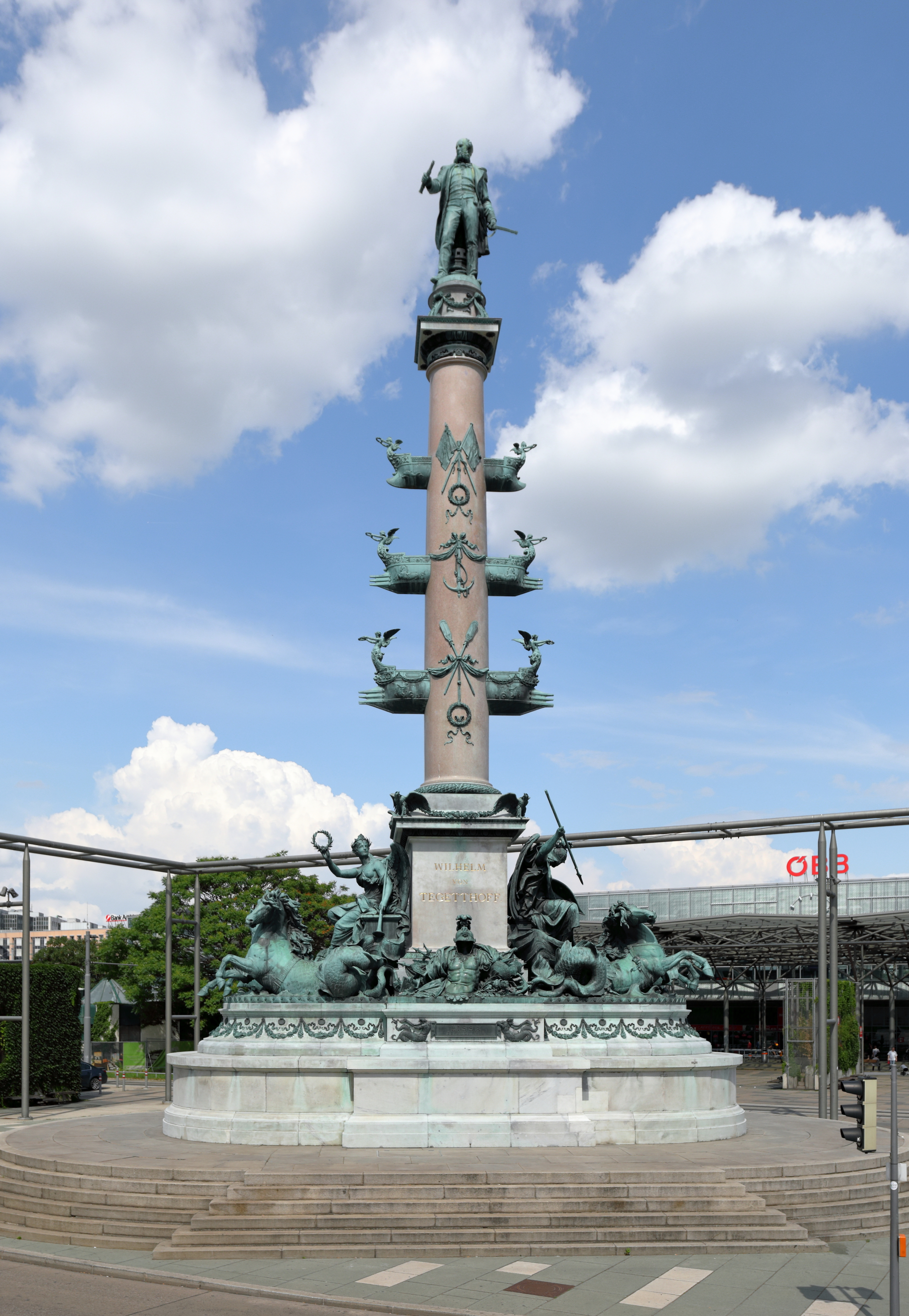 Südwestansicht des Tegetthoff-Denkmals am Praterstern im 2. Wiener Gemeindebezirk Leopoldstadt. Das Denkmal wurde von Carl Kundmann (Statue) und Carl von Hasenauer (Architektur) gestaltet und zu Ehre von Wilhelm von Tegetthoff errichtet. Das Denkmal mit einer rd. 11 Meter hohen Marmorsäule und einer 3,5 Meter hohen bronzenen Statue des Admirals wurde am 21. September 1886 enthüllt.